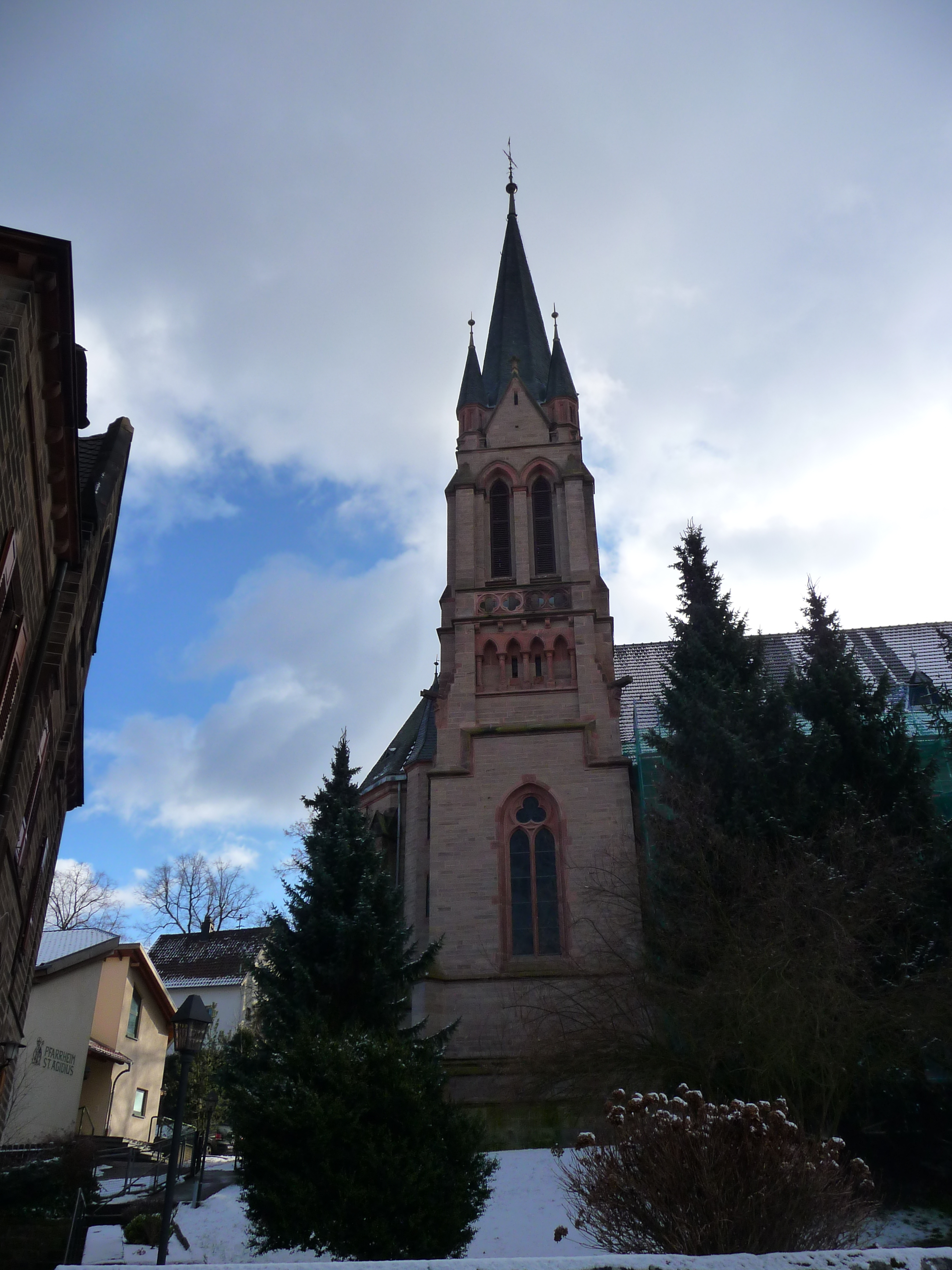 Turm der katholischen Kirche St. Ägidius in Kusel (Kreis Kusel, Deutschland)